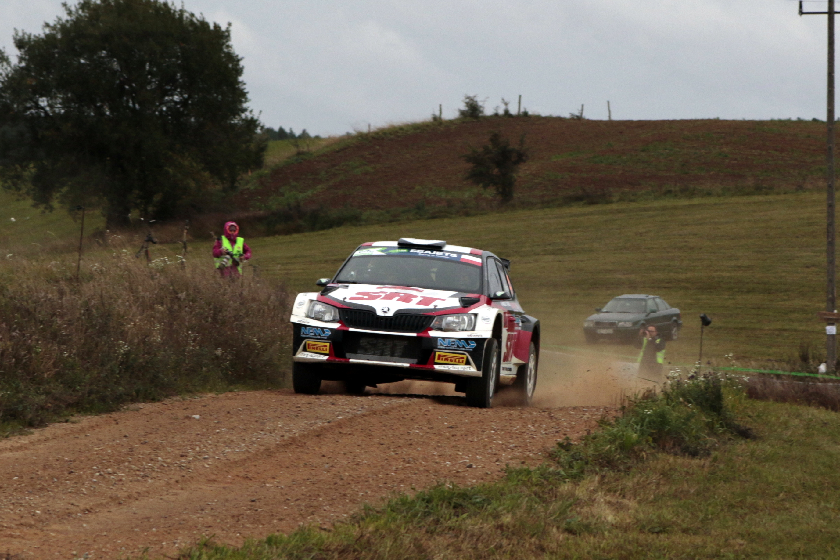 Rajd Polski - 2018 Nikolay Gryazin